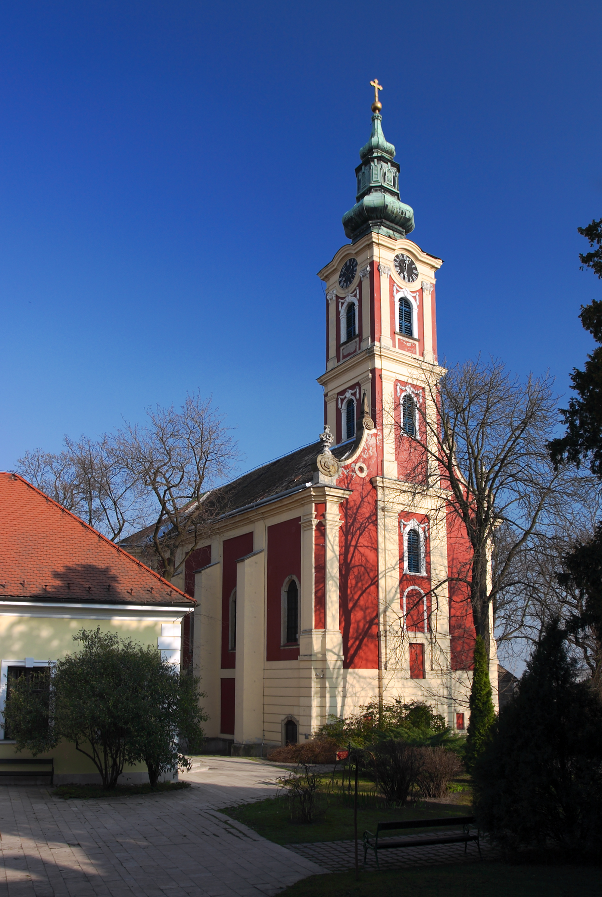 Görögkeleti püspöki székesegyház (Belgrád-templom) (Szentendre, Alkotmány u.)